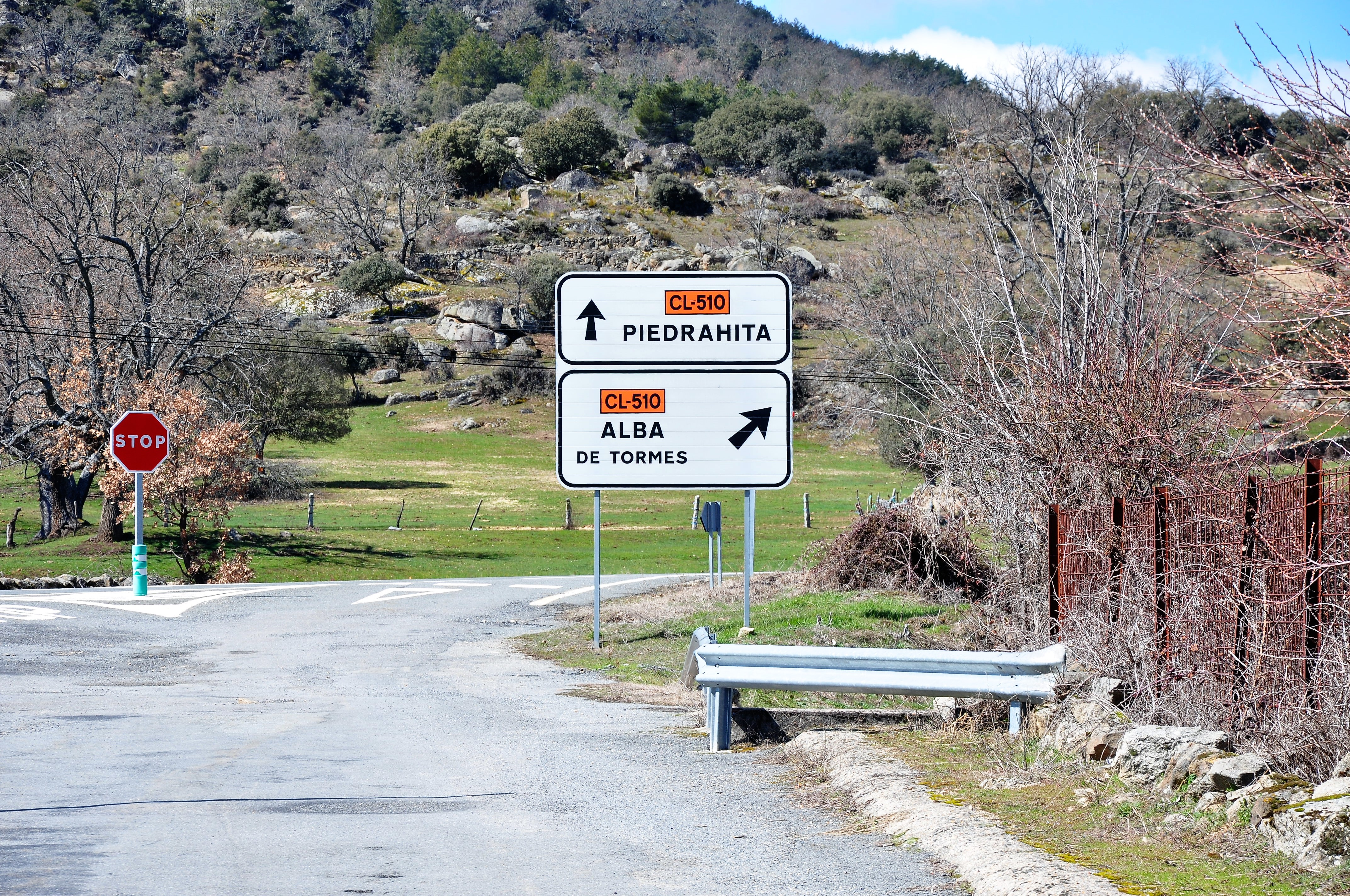 Señales en la carretera en Collado del Mirón, Ávila, España